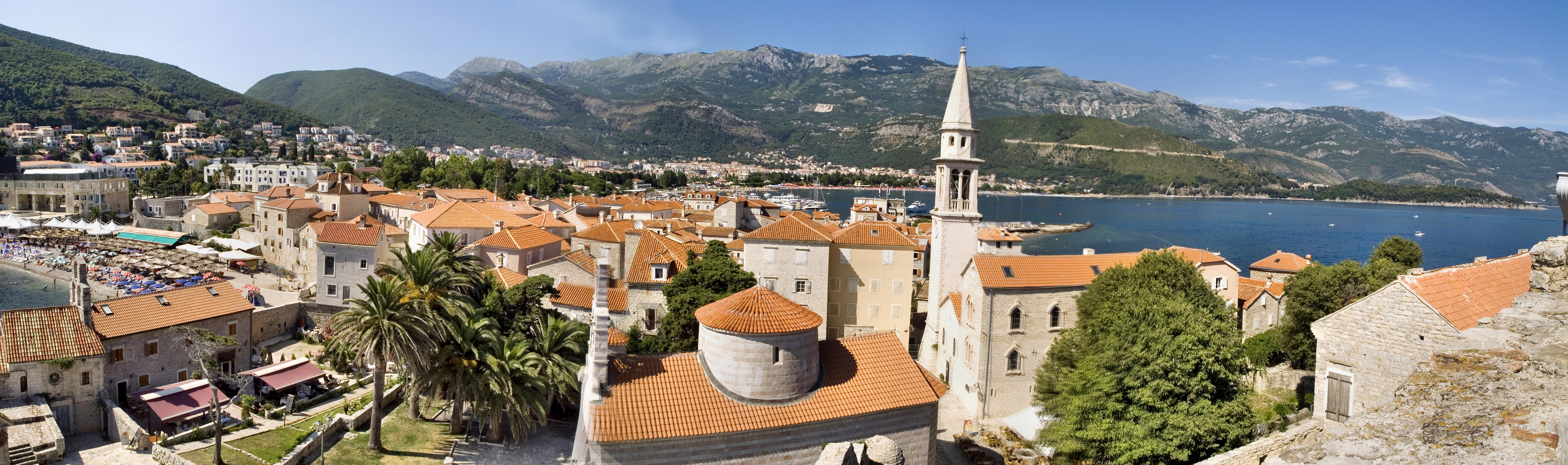 Черногория, Будва, старый город